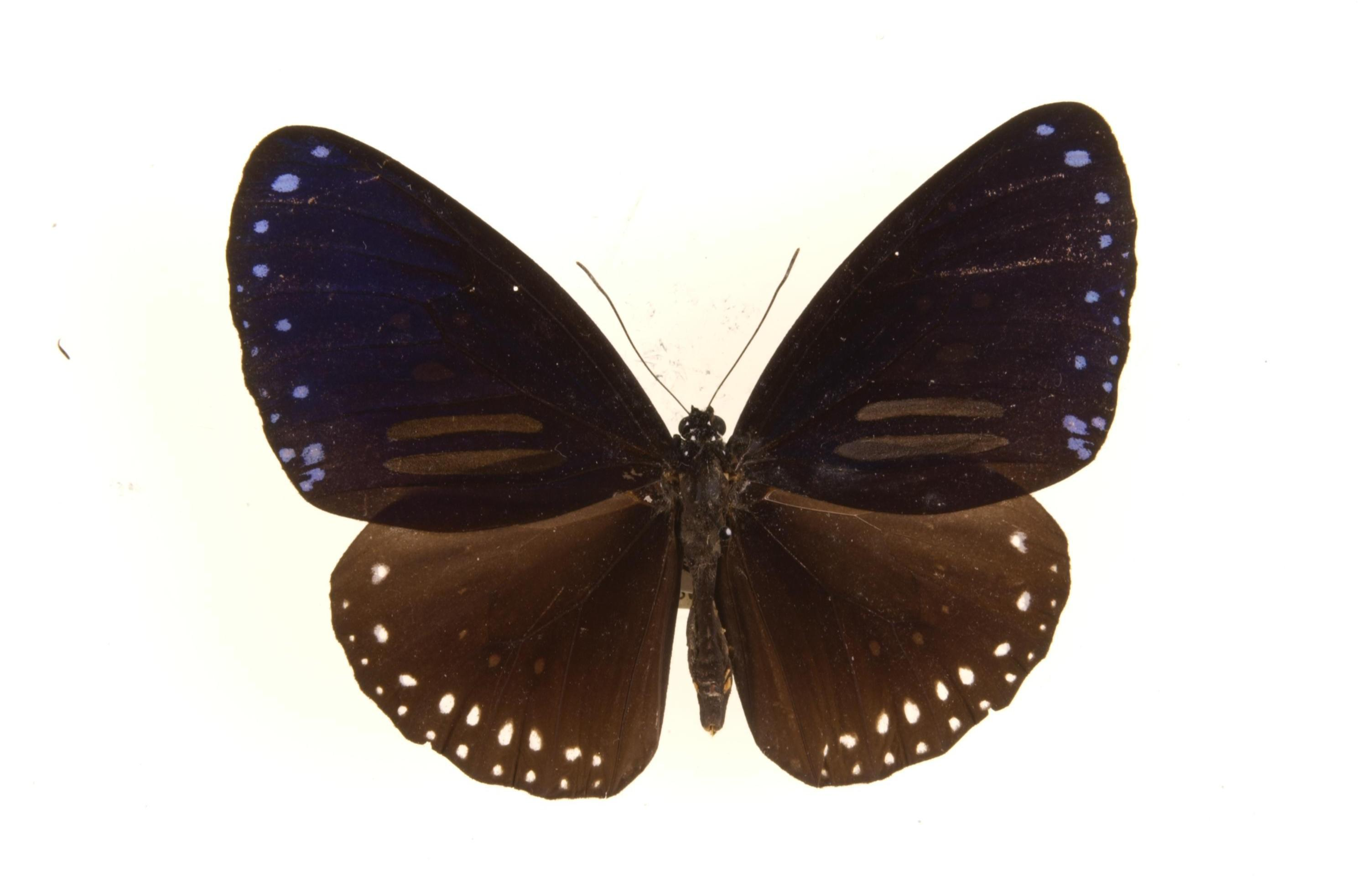 Euploa sylvestre